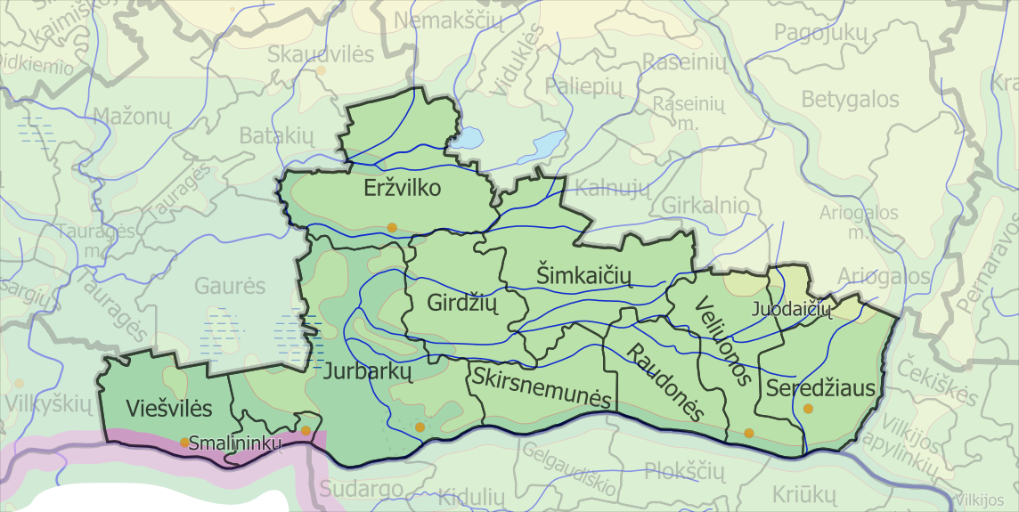 Jurbarko rajono savivaldybės seniūnijos (lt::image:LietuvosSeniunijos.png)